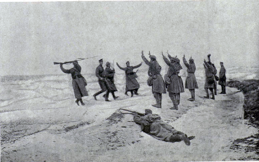 «Сдаемся! Оборона предместья Прасныша» // Великая война в образах и картинах : [в 14 вып.] / под ред. Ив. Лазаревского. — М.: Издание Д. Я. Маковского, 1914-1917 (Товарищество типографии А. И. Мамонтова); [Вып. 6]. — май 1915. — С. 290.